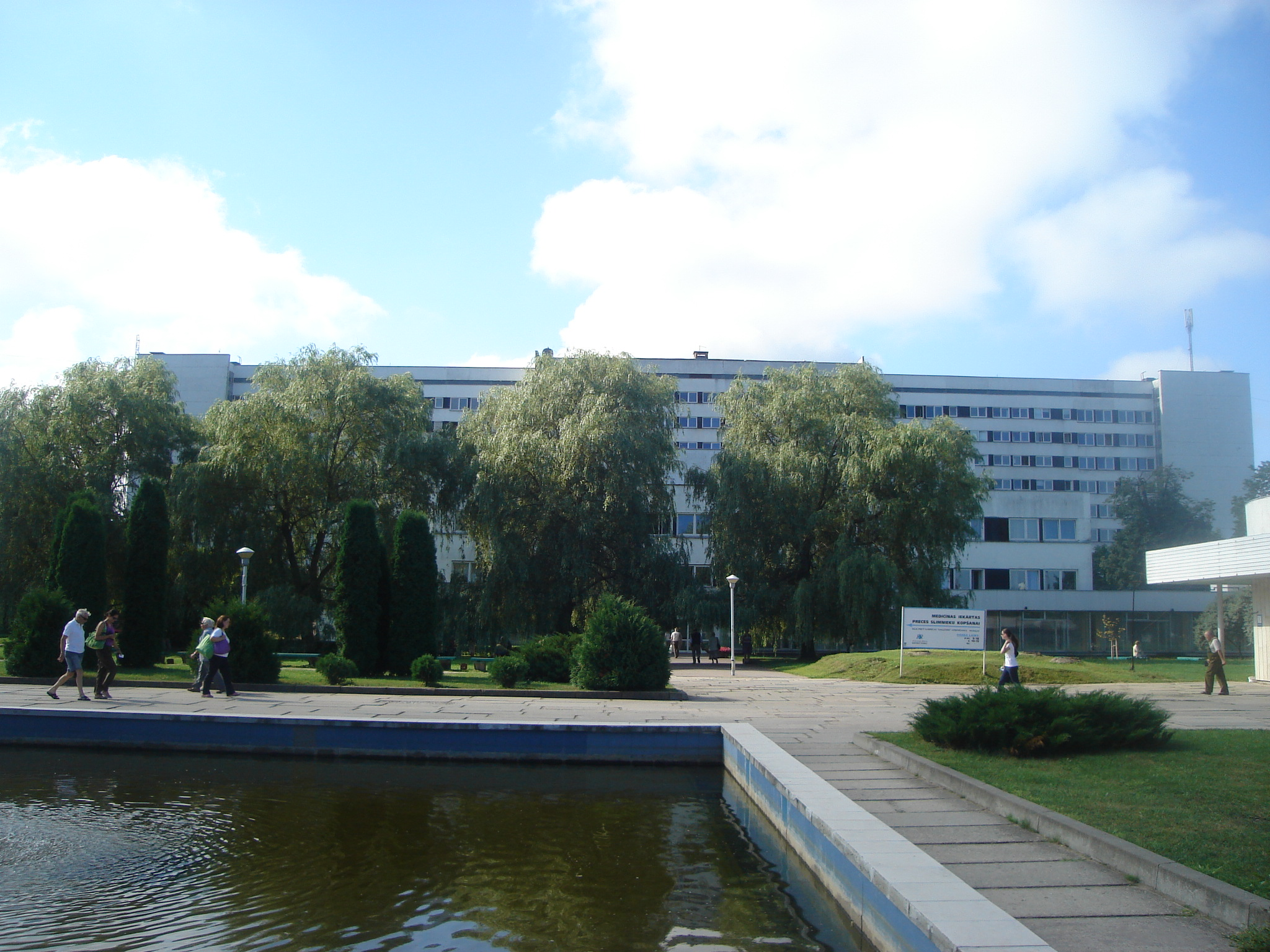 LOC-Latvijas onkoloģijas centrs